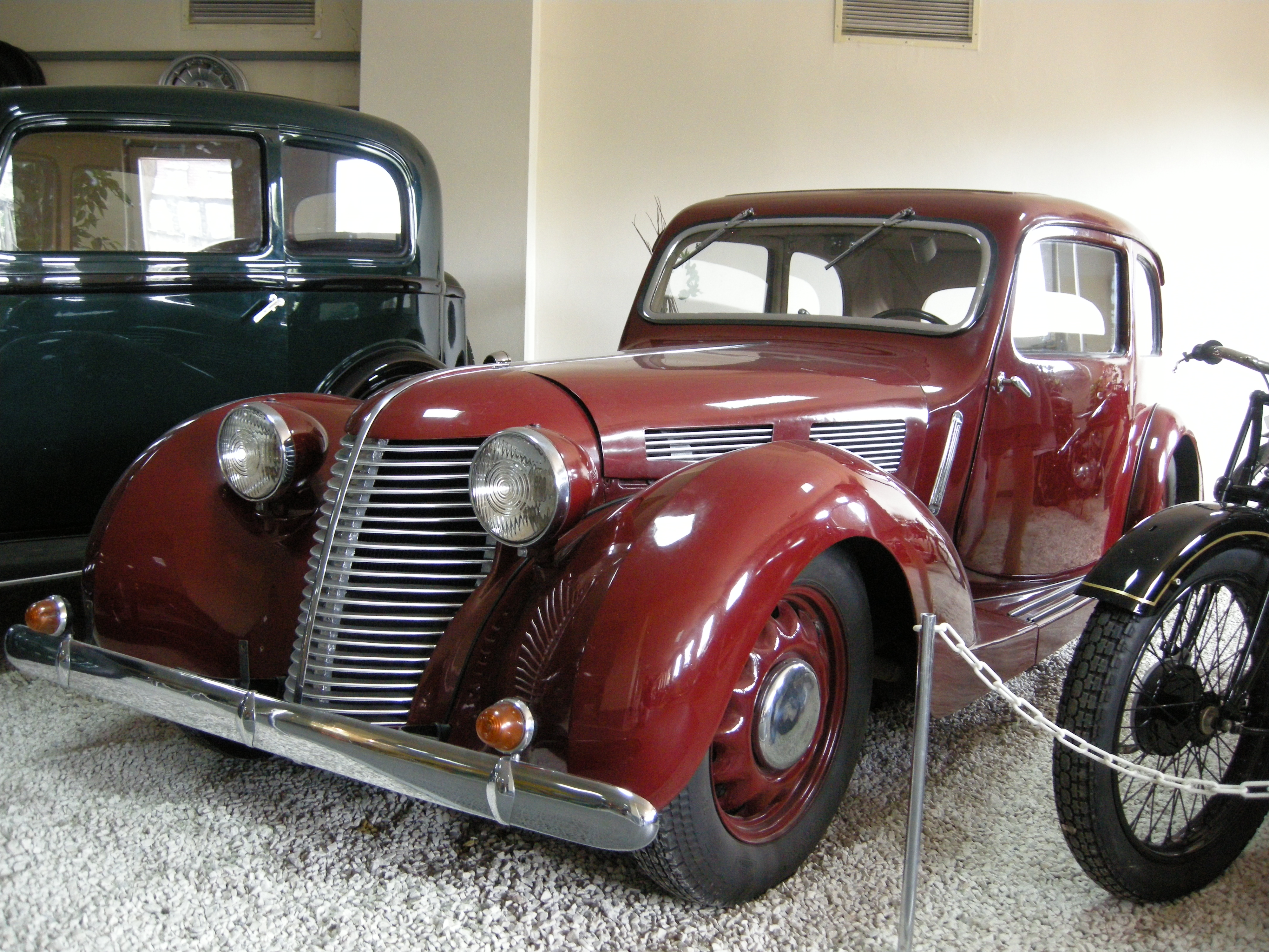 Samochód Aero 30, produkcji czechosłowackiej, Muzeum Motoryzacji w Poznaniu